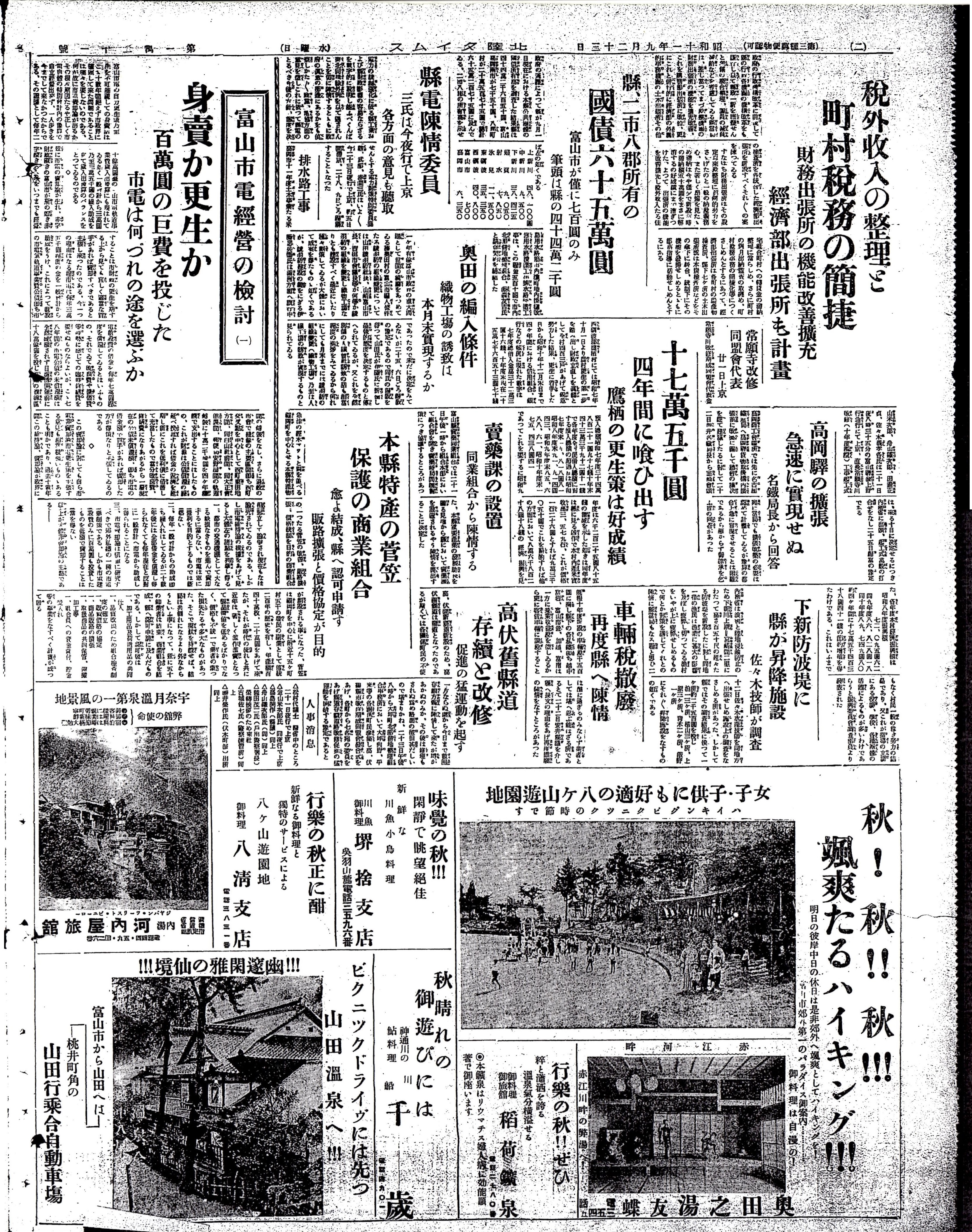 八ヶ山遊園地、山田温泉等広告あり